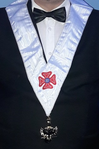 31 AASR